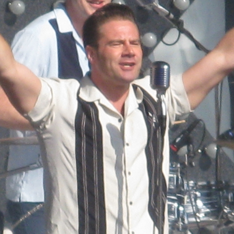 Dick Brave beim Deichbrand-Festival 2012